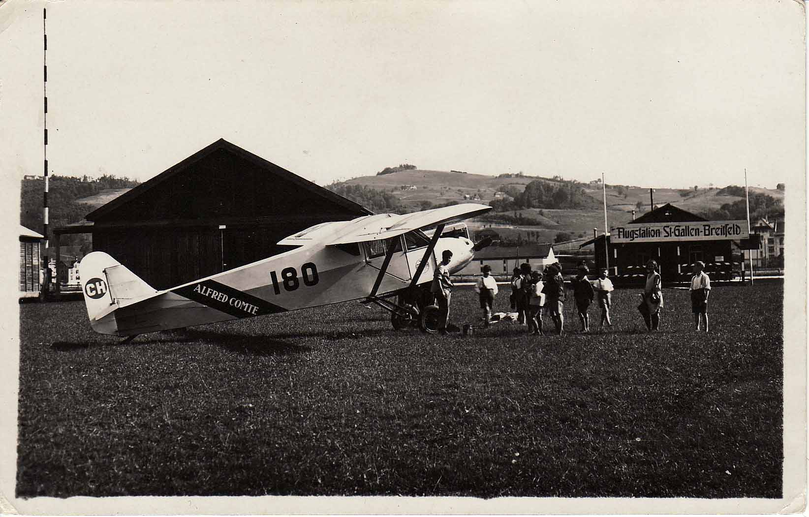 Winkeln, Breitfeld, Flugplatz enthält:Blick gegen Süden